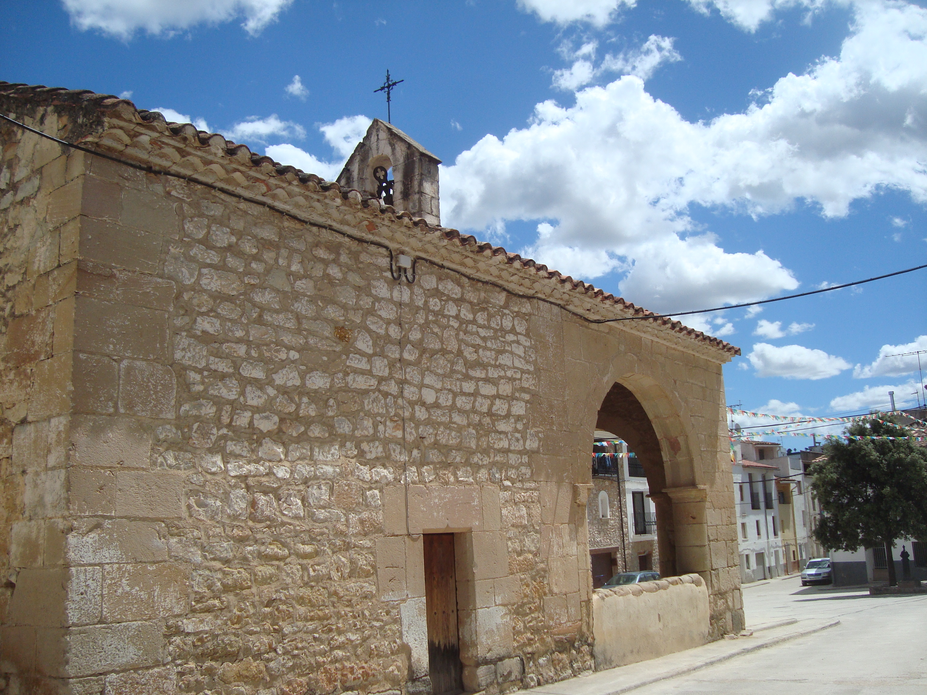 Ermita de Loreto (Atzeneta del Maestrat) 04.001-005.